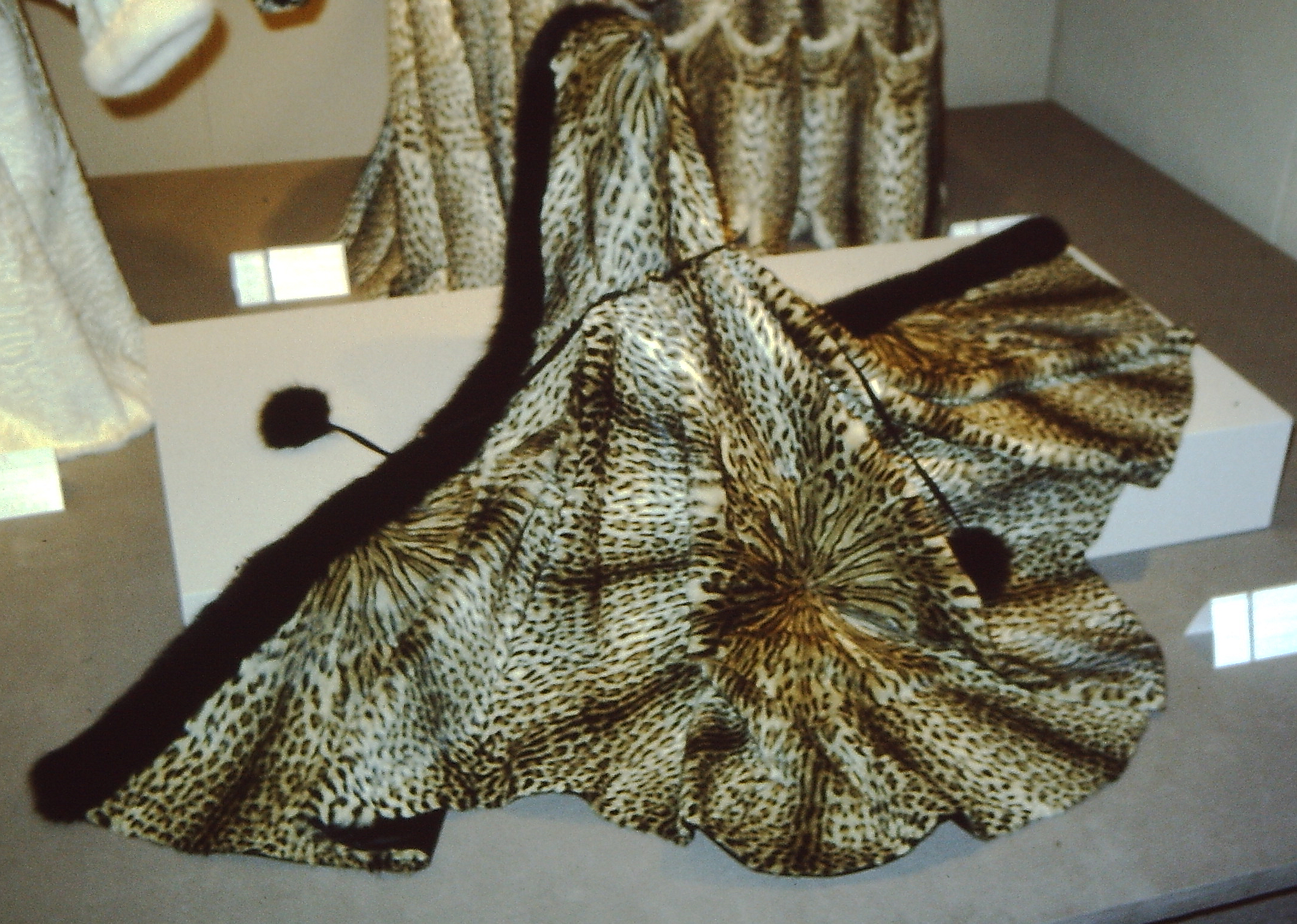 Leistungswettbewerb des Kürschnerhandwerks, Leistungsschau 1982, anlässlich der Pelzmesse in Frankfurt am Main. Wildkatzencape mit Nerz.